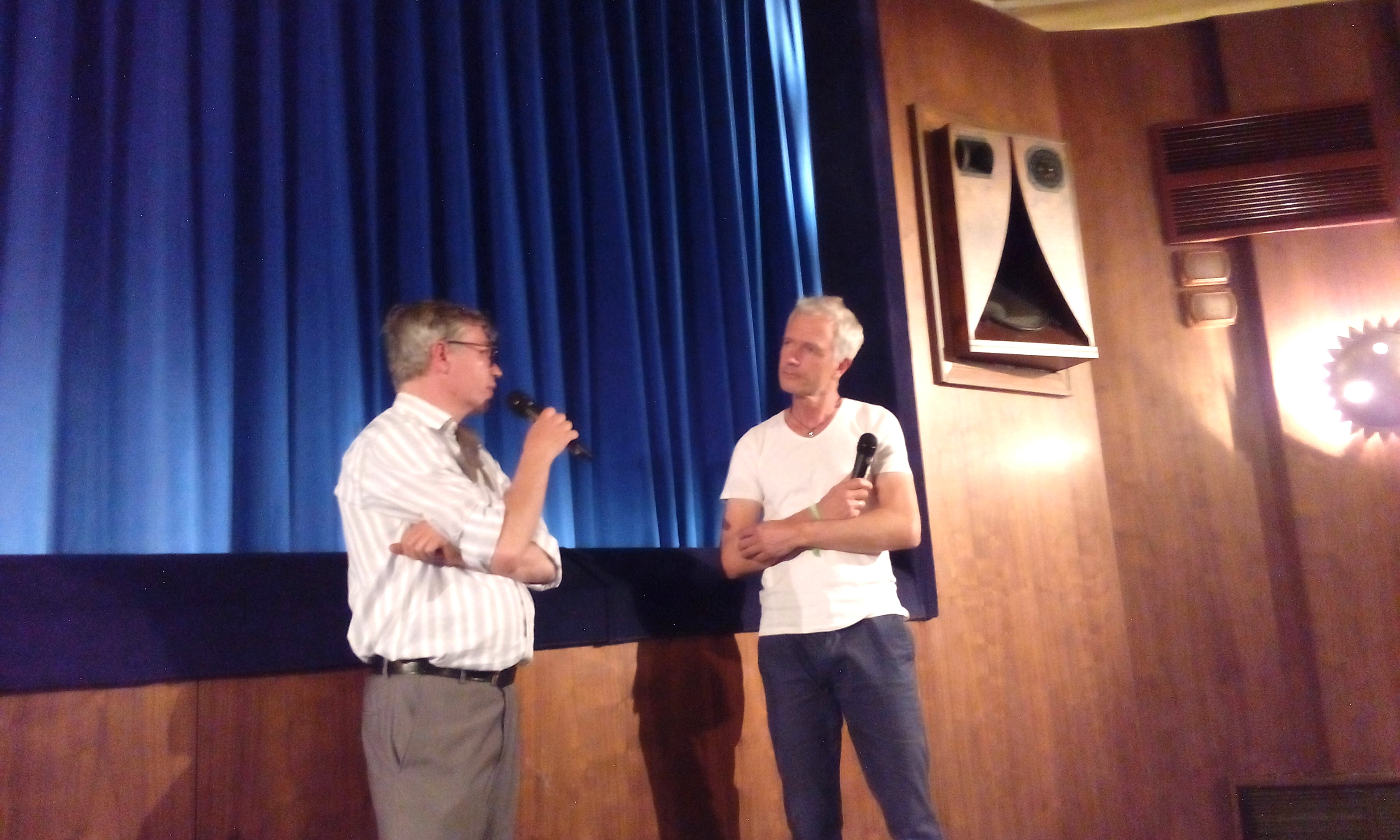 Der Regisseur und Kameramann Thomas Riedelsheimer rechts im Bild bei seiner Vorstellung des Kinofilms "Die Farbe der Sehnsucht". Aufnahme von 2017.